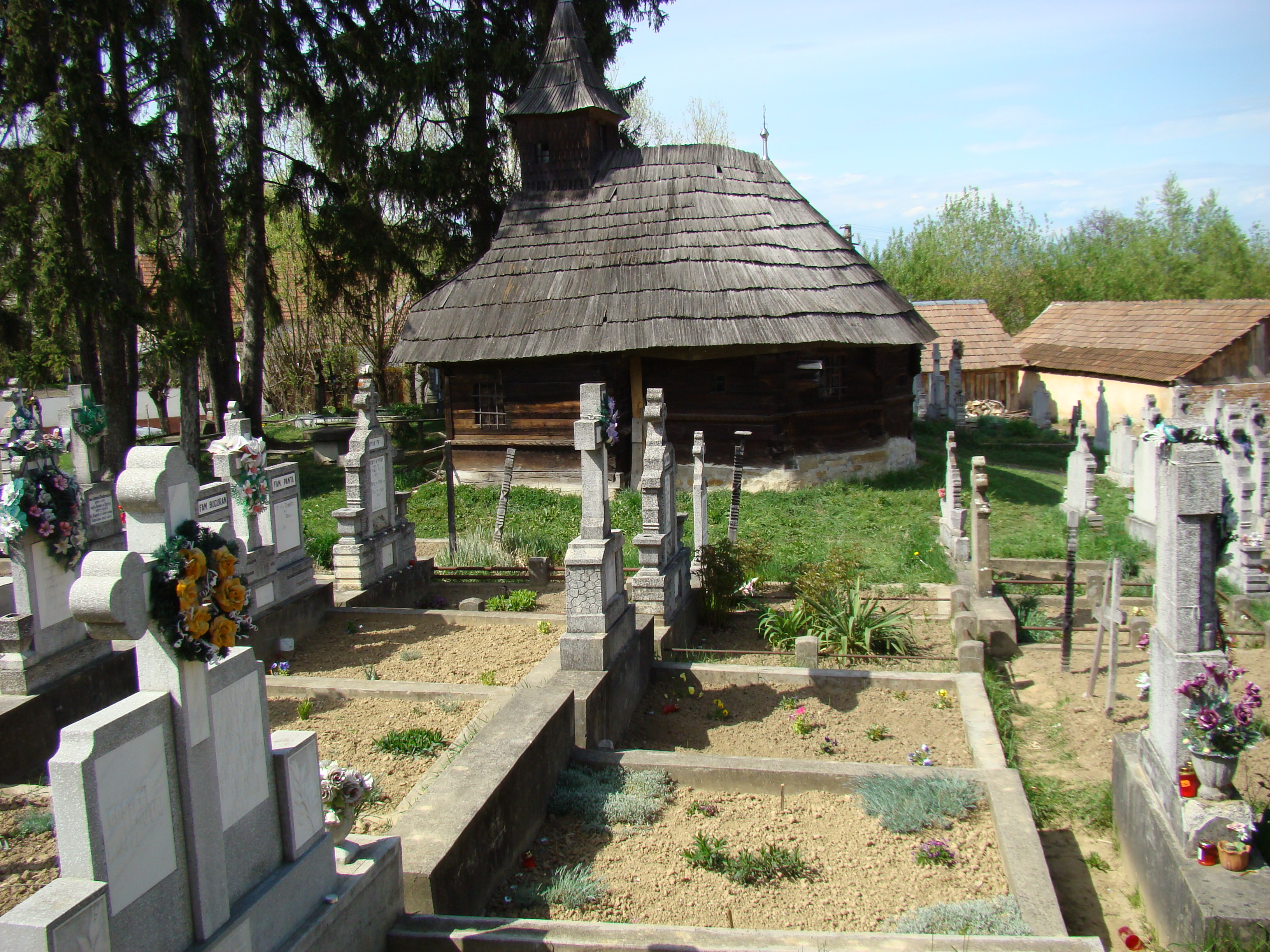 Biserica de lemn din Pianu de Sus, judeţul Alba.